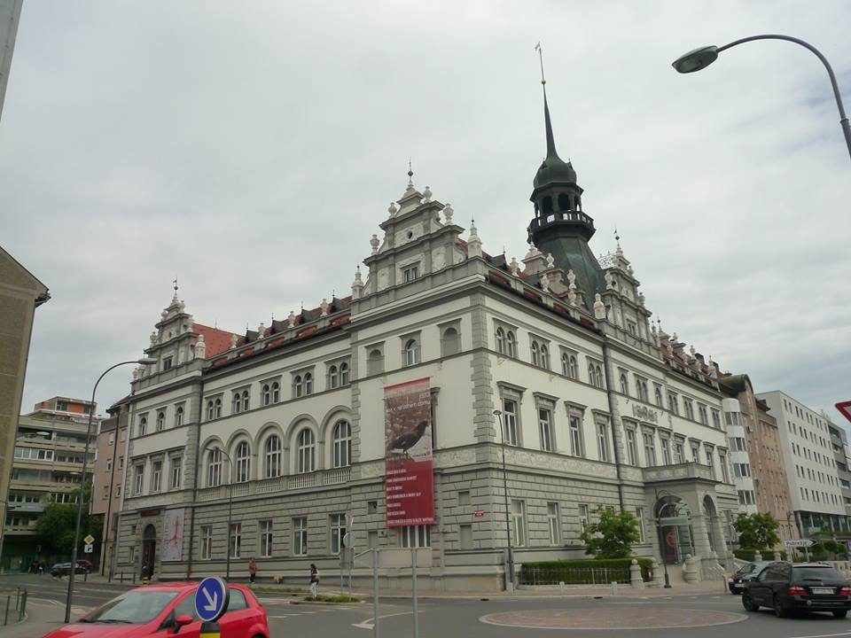 971457_418248601614742_614237667_n